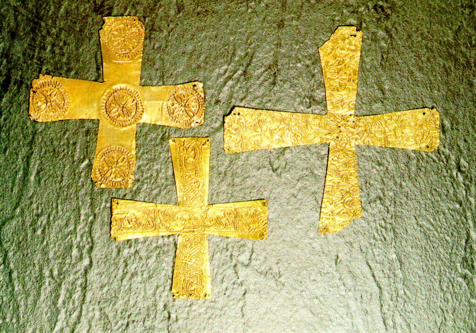 Crocette Longobarde sbalzate, di area bergamasca, nell'ex Museo archeologico di Bergamo. Foto di Giorces.